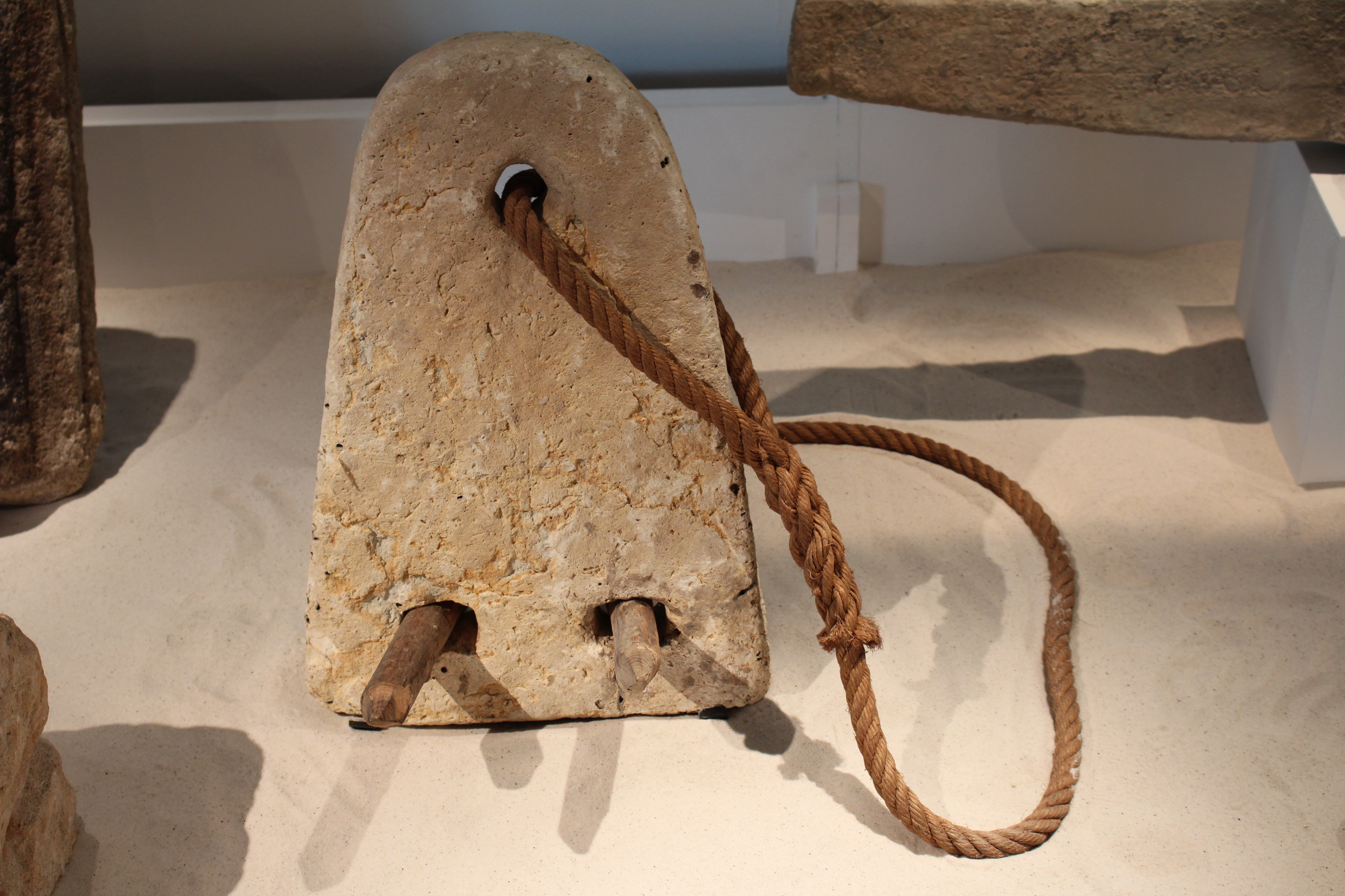 Ancre pesant 17 kg (Fos sur mer, anse Saint Gervais).